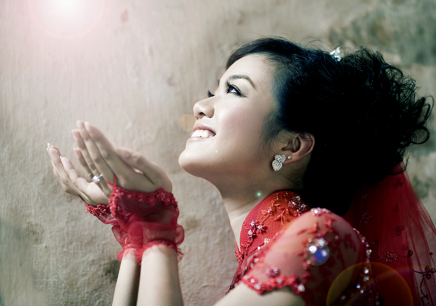 Explore #136